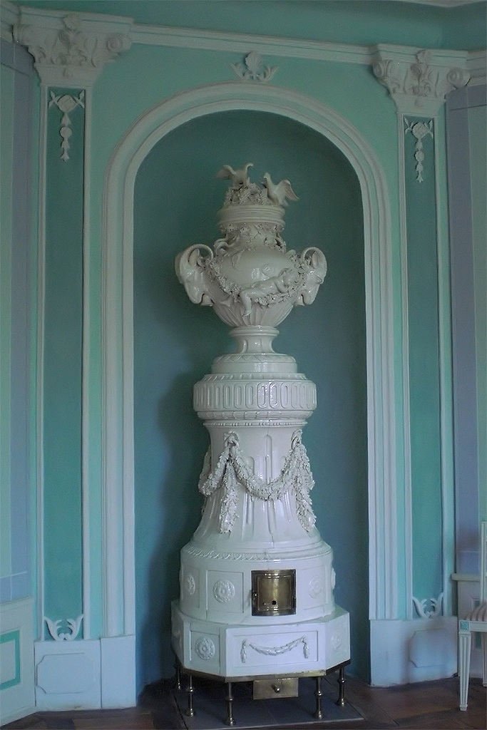 Ofen im Gartensaal im ersten Stock des Schlosses Wolfshagen